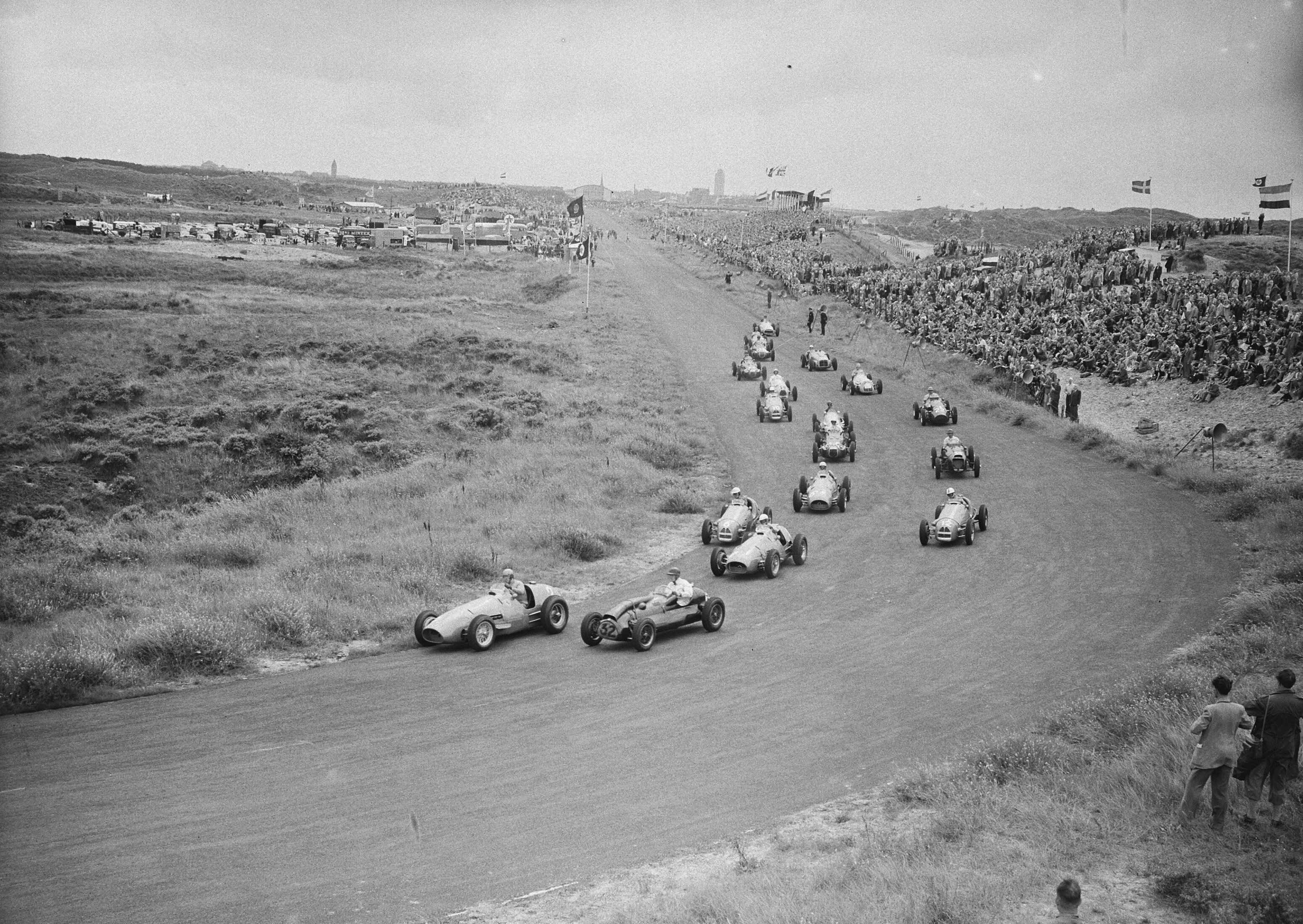 Collectie / Archief : Fotocollectie Anefo Reportage / Serie : [ onbekend ] Beschrijving : Grote Prijs Nederlandse autoraces Zandvoort. Eerste bocht Datum : 17 augustus 1952 Locatie : Noord-Holland, Zandvoort Trefwoorden : AUTORACES, PRIJS, bochten Fotograaf : Bilsen, Joop van / Anefo Auteursrechthebbende : Nationaal Archief Materiaalsoort : Glasnegatief Nummer archiefinventaris : bekijk toegang 2.24.01.09 Bestanddeelnummer : 905-2686